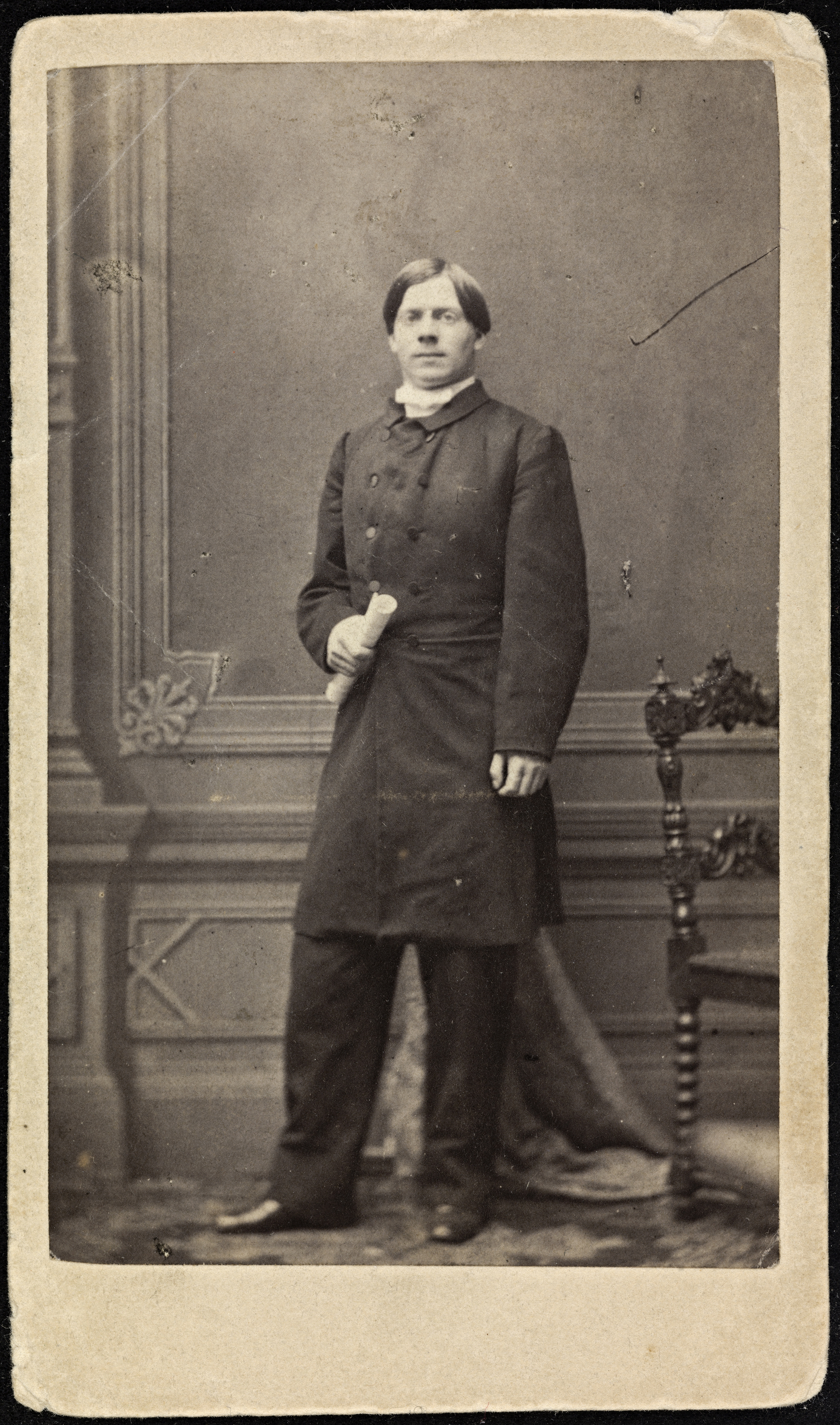 Beskrivelse / Description: Visittkort. Nordraak var komponist og skrev bl.a. melodien til "Ja, vi elsker dette landet" Dato / Date: ca 1860 Sted / Place: Tyskland, Berlin Fotograf / Photographer: Rud. Goepel (Berlin) Digital kopi av original / Digital copy of original: s/h papirpositiv Eier / Owner Institution: Nasjonalbiblioteket / National Library of Norway Lenke / Link: Bildesignatur / Image Number: blds_06012